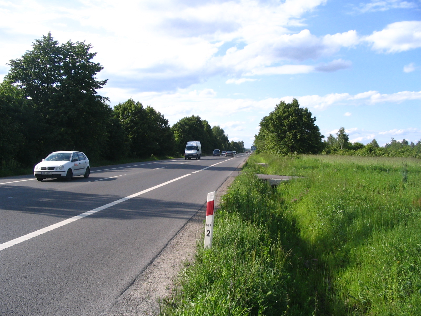 description en: Main road number 9 (european road 371). Photo taken near Rzeszów opis pl: Droga krajowa nr 9 (europejska 371), odcinek między Rzeszowem i Głogowem Małopolskim author/autor: Gardomir (polish wiki:[1]) source/źródło: a photograph taken by me (fotografia wykonana przeze mnie)